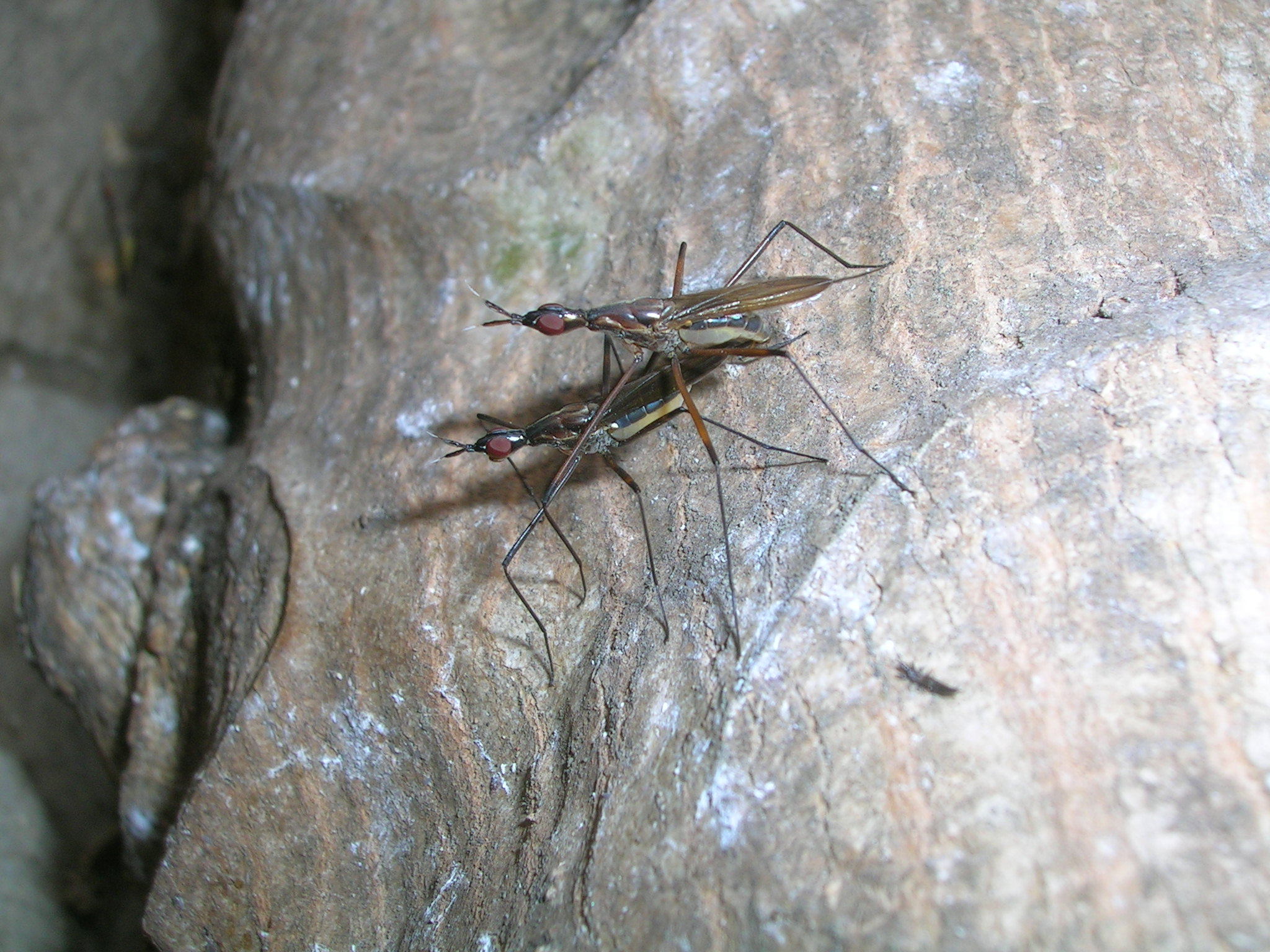 Telostylinus lineolatus Neriidae in copula (Bangalore, India)